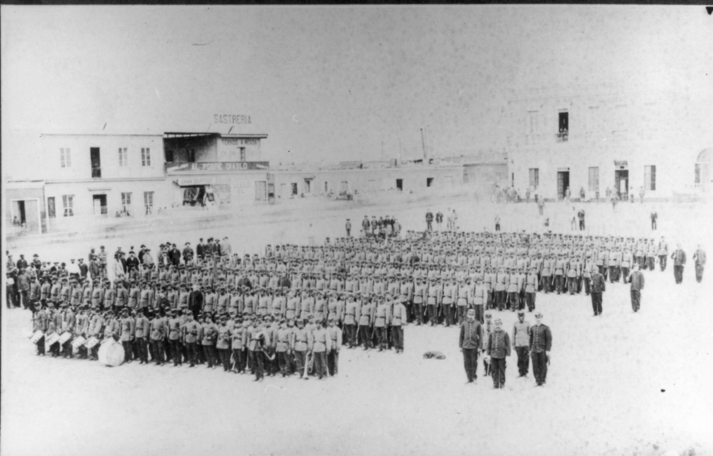 6º de Línea Chacabuco (Antofagasta, 1879)